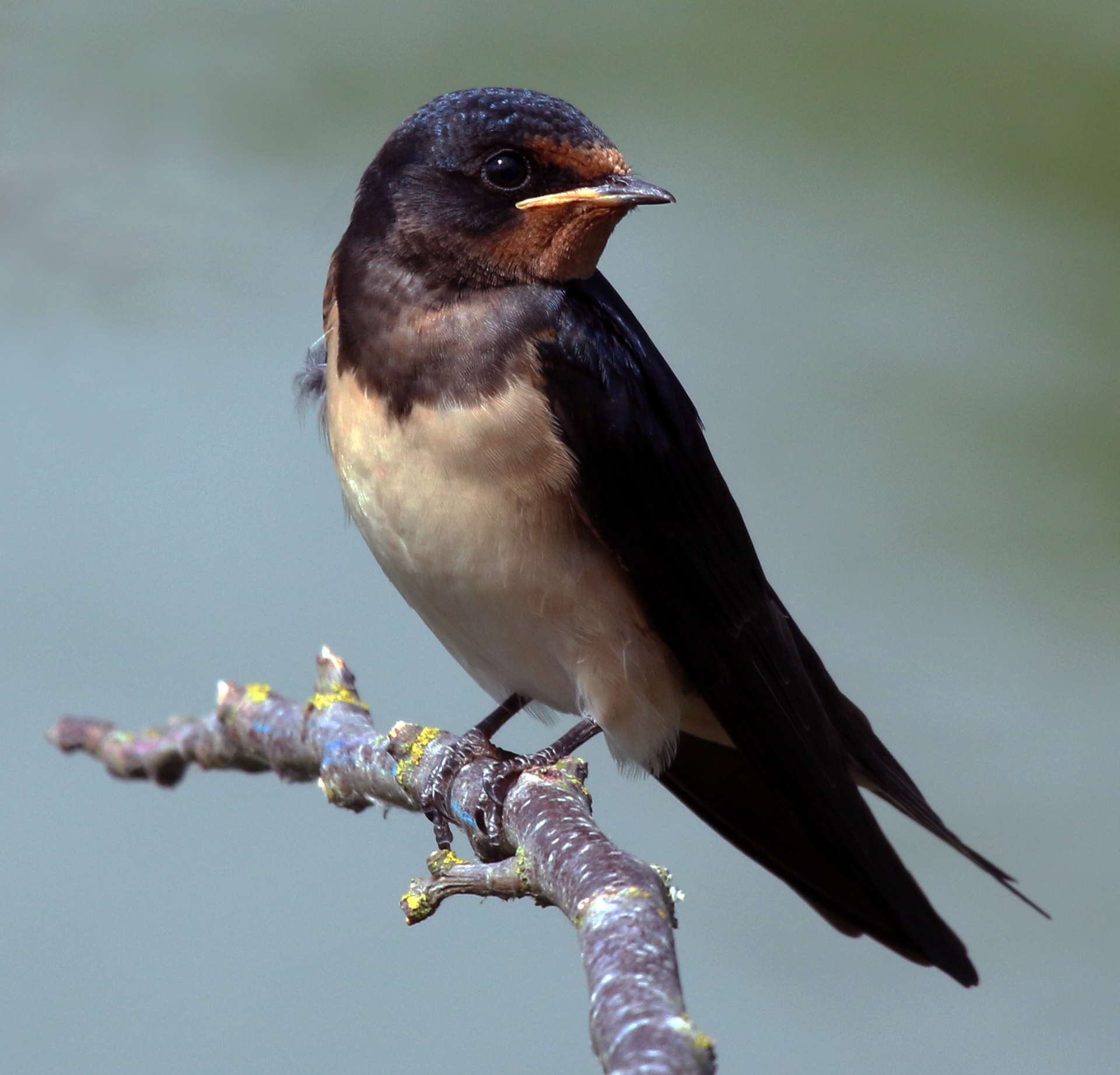 Boerenzwaluw (Hirundo rustica rustica)